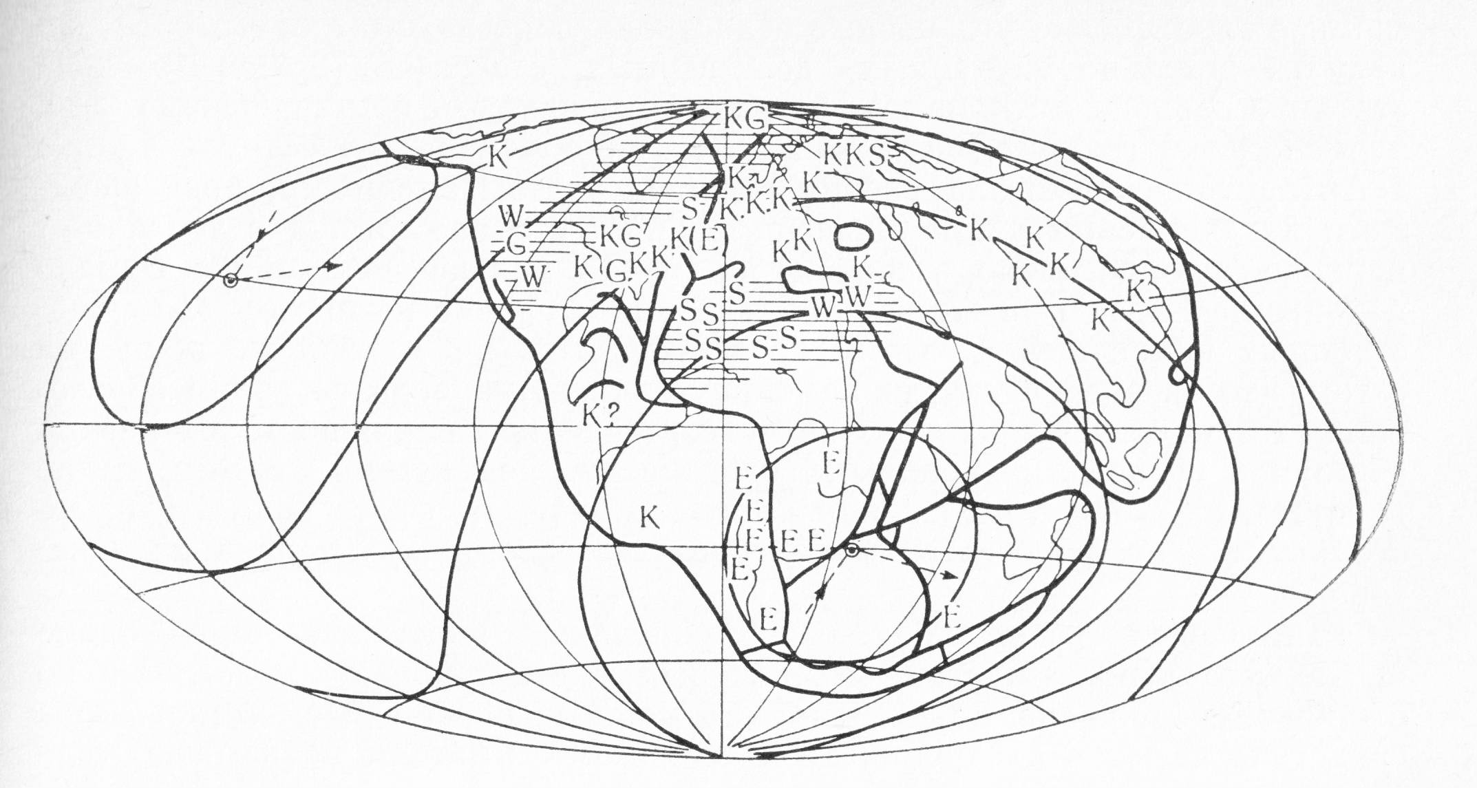 Палеоклиматическая реконструкция Альфреда Вегенера на время пермского и каменноугольного периодов